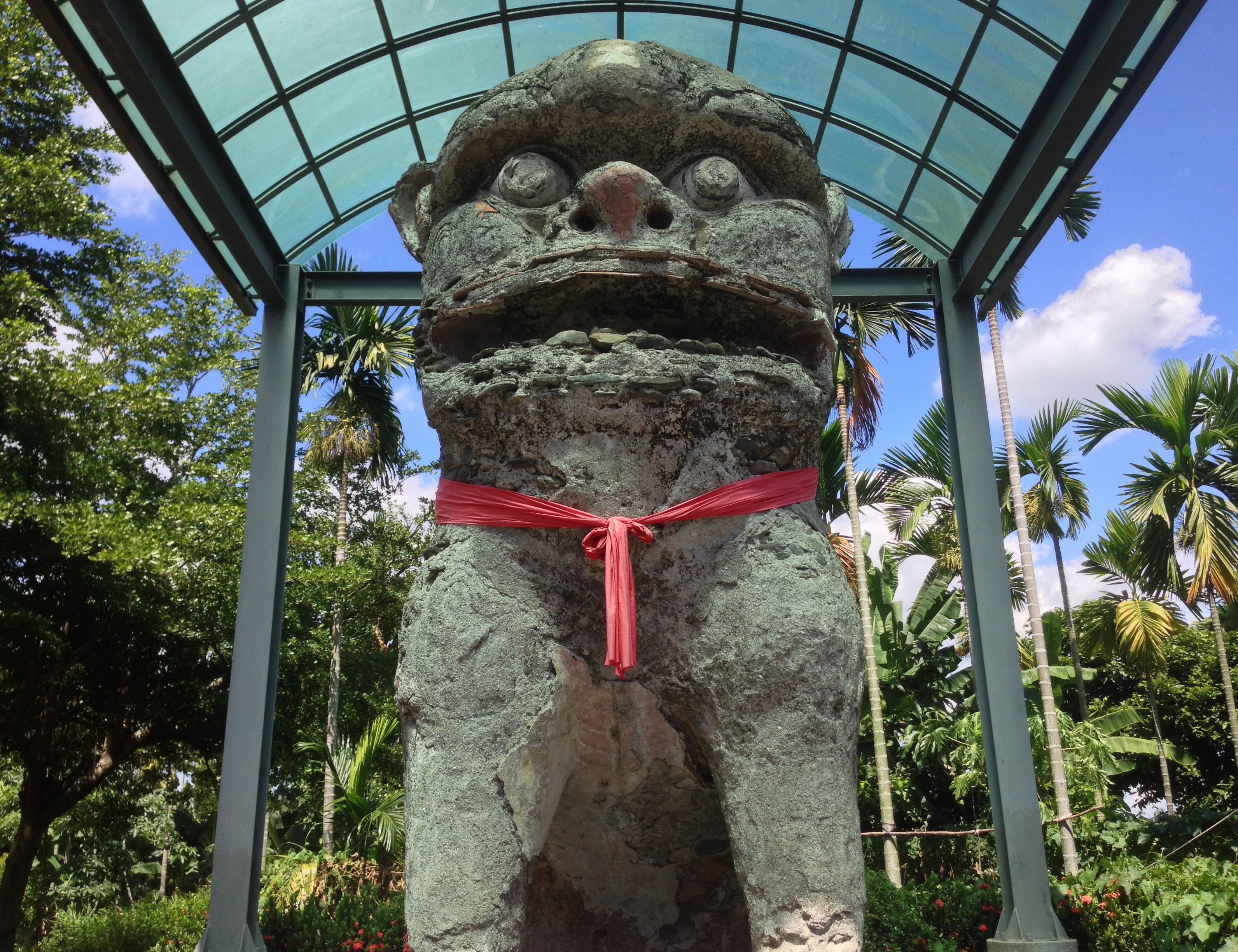 中文（台灣）: 獅老二正面